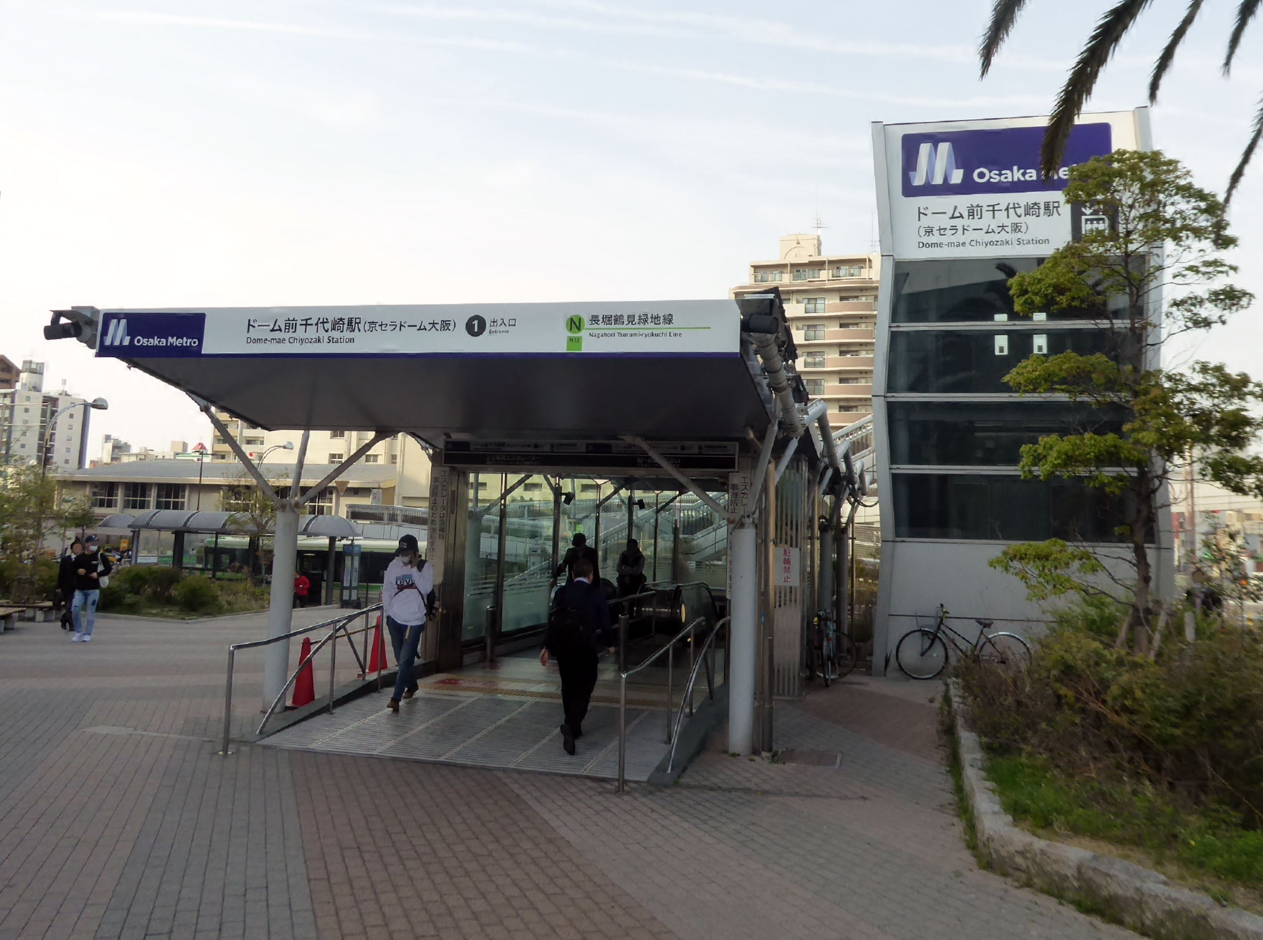 Osaka Metroドーム前千代崎駅1番出入口を撮影。